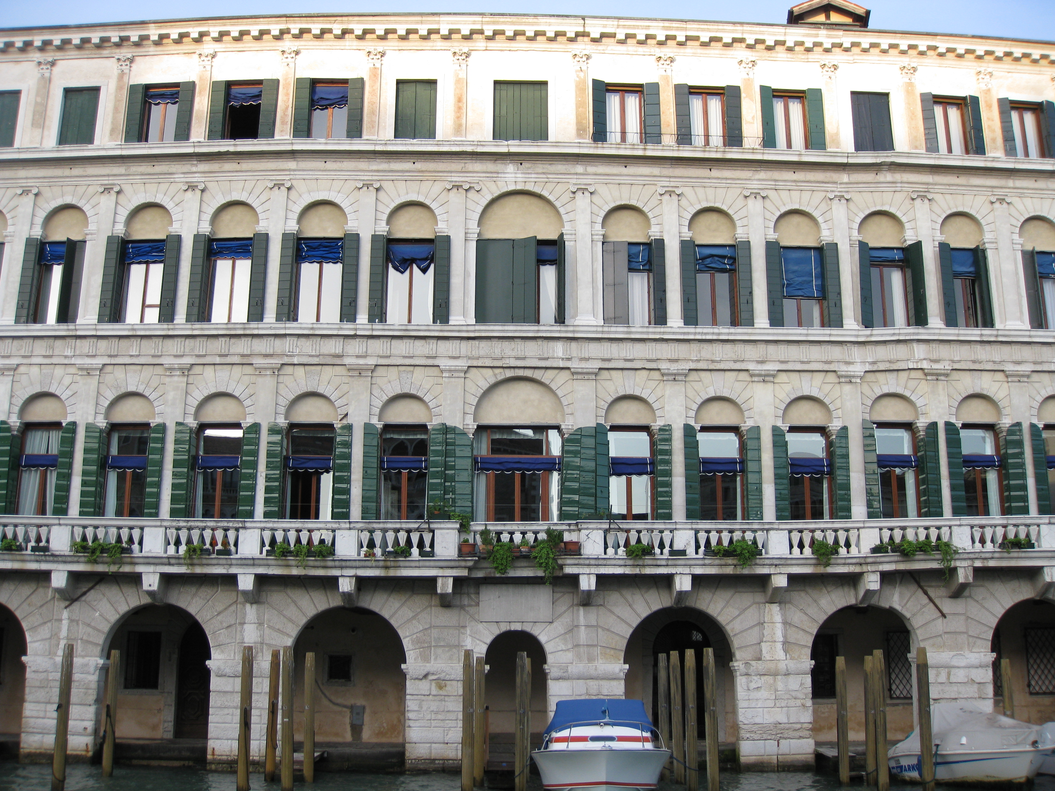 Palazzo Moro Lin